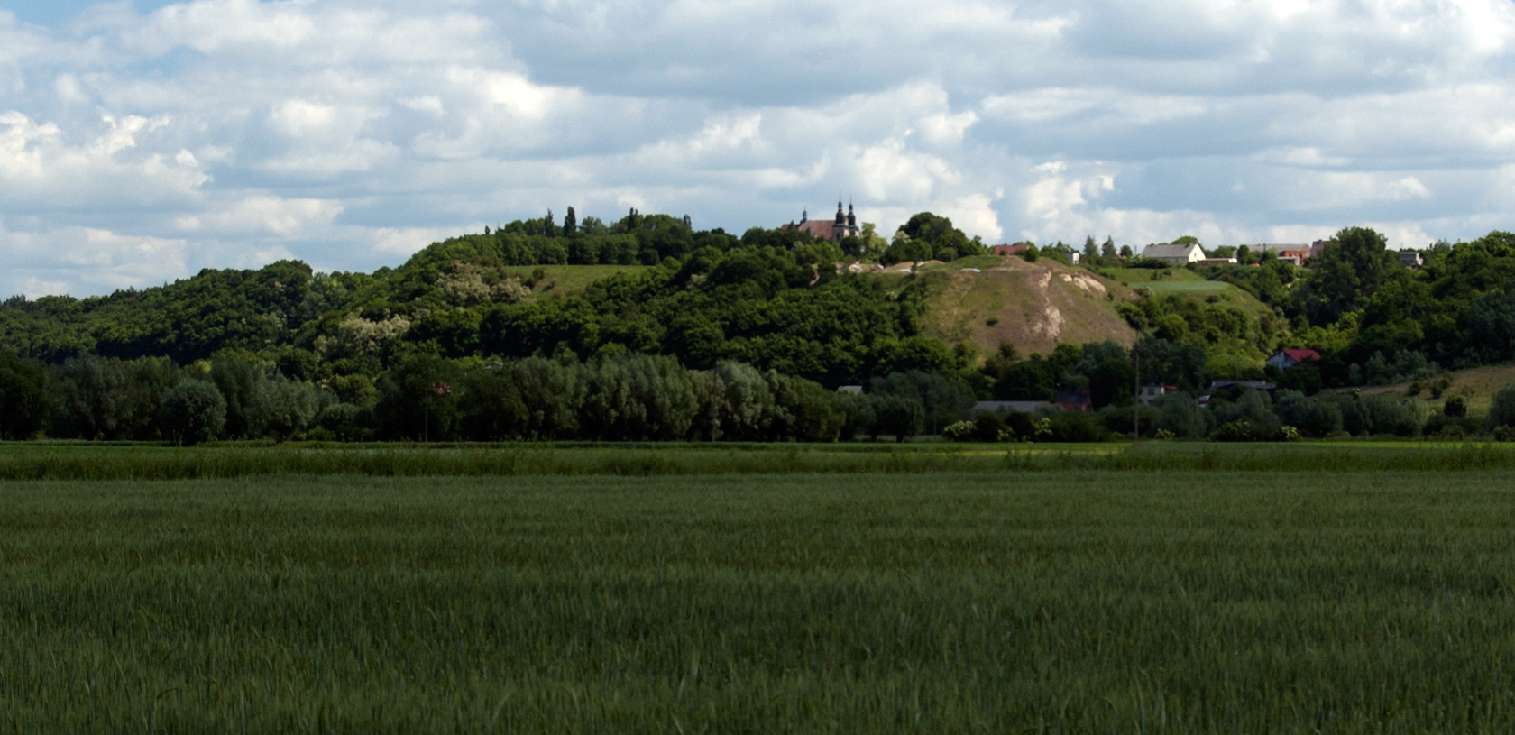 ruiny zamku (góra Zamkowa) Starogród